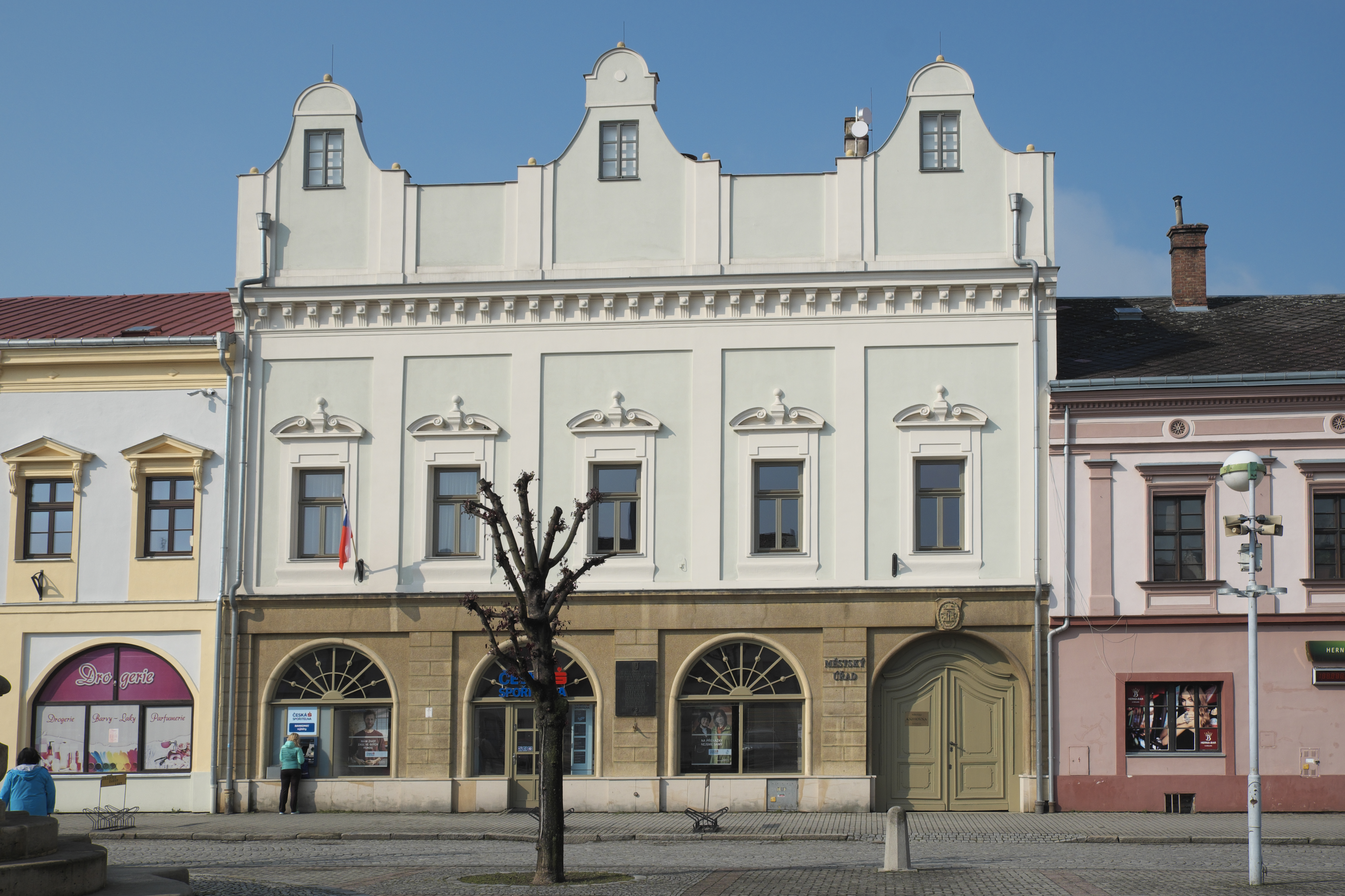 Rathaus in Tovačov im Okres Přerov in der Olmützer Region in Tschechien